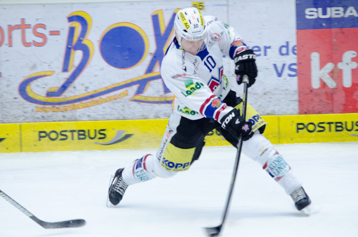 Düsseldorfer EG VS. EHC Biel